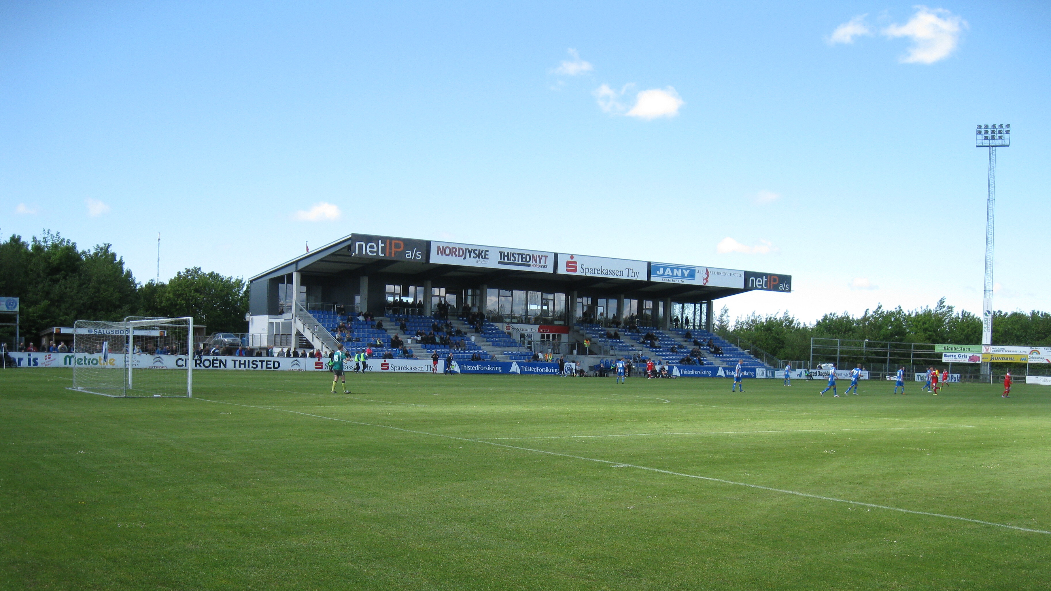 Lerpytter Stadion, Thisted